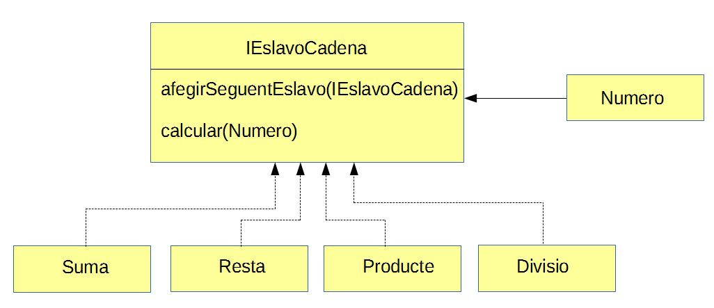 Exemple d'us de cadena de responsabilitats